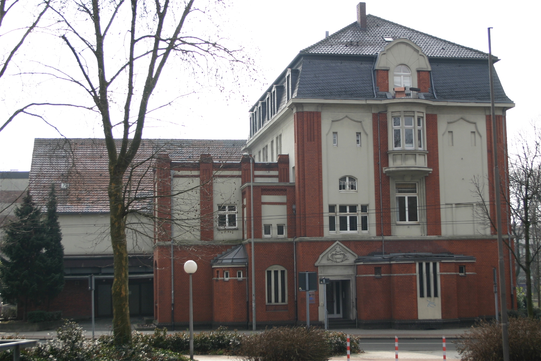 Gemeindehaus der ev. Christuskirche in Alt-Oberhausen